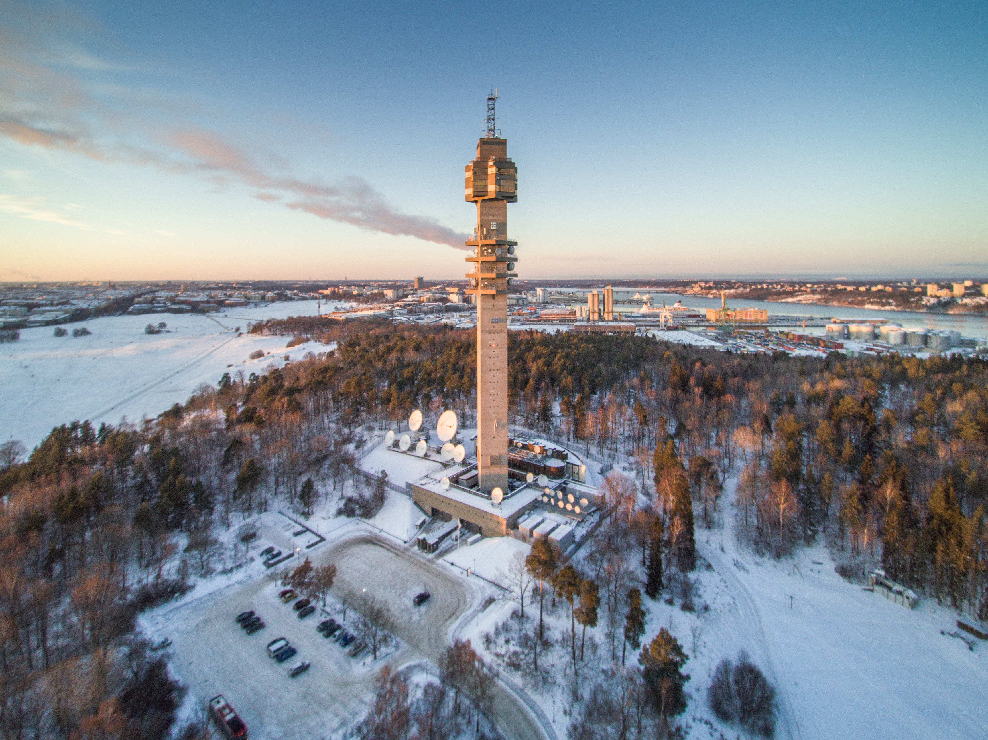 The Kaknäs Tower, Rootsi 2016 jaanuar